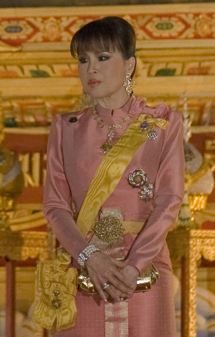 นายกรัฐมนตรี และภริยา เฝ้าฯ รับเสด็จ สมเด็จพระเทพรัตนราชสุดาฯ สยามบรมราชกุมารี เสด็จพระราชดำเนินพร้อมด้วยพระบรมวงศานุวงศ์ในงานสโมสรสันนิบาตเฉลิมพระเกียรติพระบาทสมเด็จพระเจ้าอยู่หัว เนื่องในโอกาสมหามงคลเฉลิม พระเกียรติพระชนมพรรษา วันอังคารที่ 7 ธันวาคม พ.ศ.2553 (Photographer attached to the Prime Minister of the Kingdom of Thailand : Peerapat Wimolrungkarat / พีรพัฒน์ วิมลรังครัตน์) @is50mm